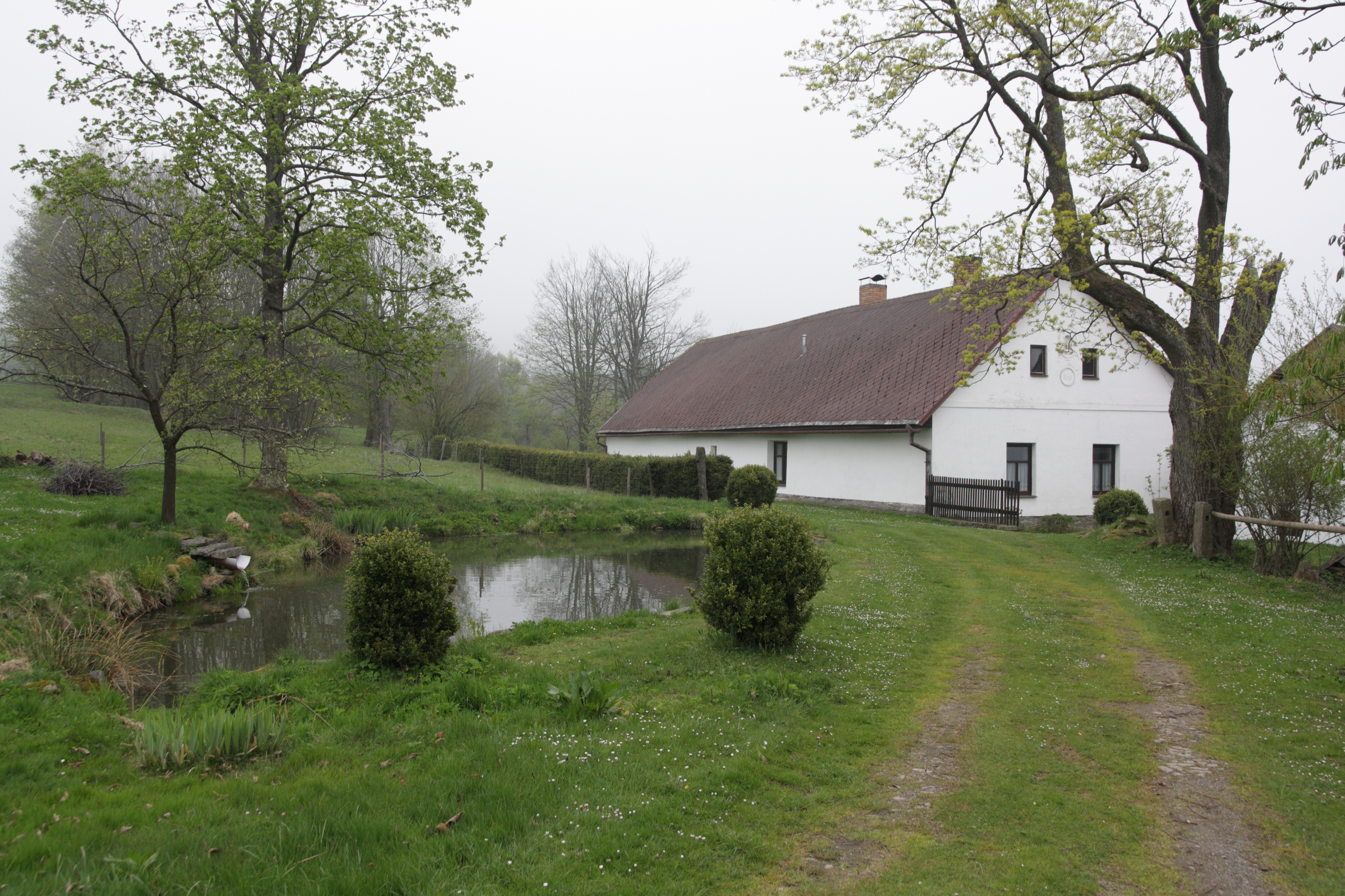 Světlá (Studená) - dům čp. 1.